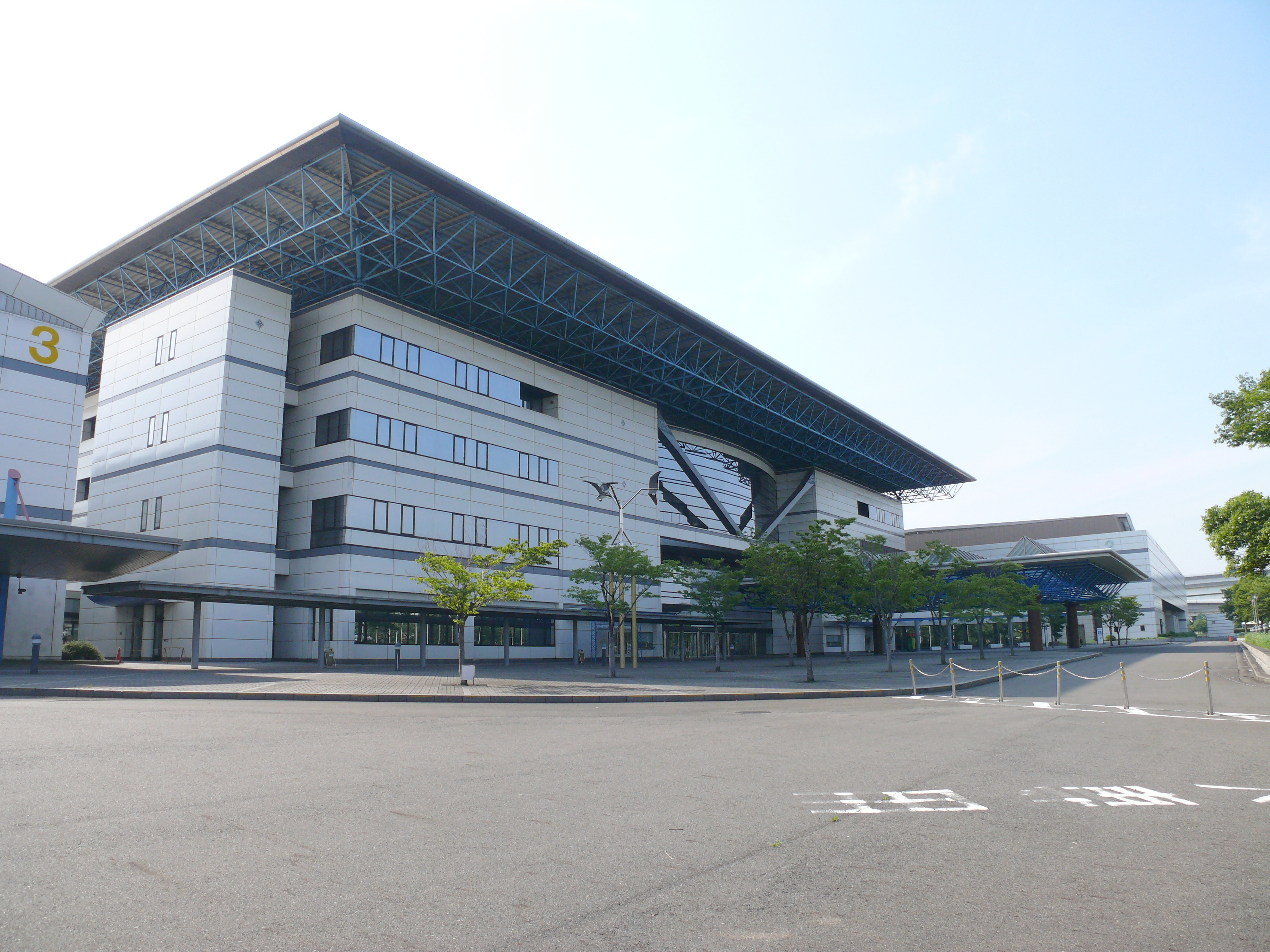 愛知県名古屋市港区にある名古屋市国際展示場（ポートメッセなごや）のメインゲート・交流センター。